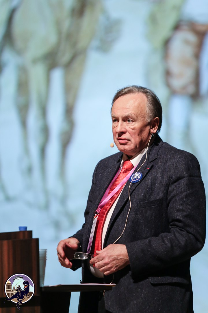 Oleg Sokolov / Оле́г Вале́рьевич Соколо́в - Ученые против мифов, Санкт-Петербург